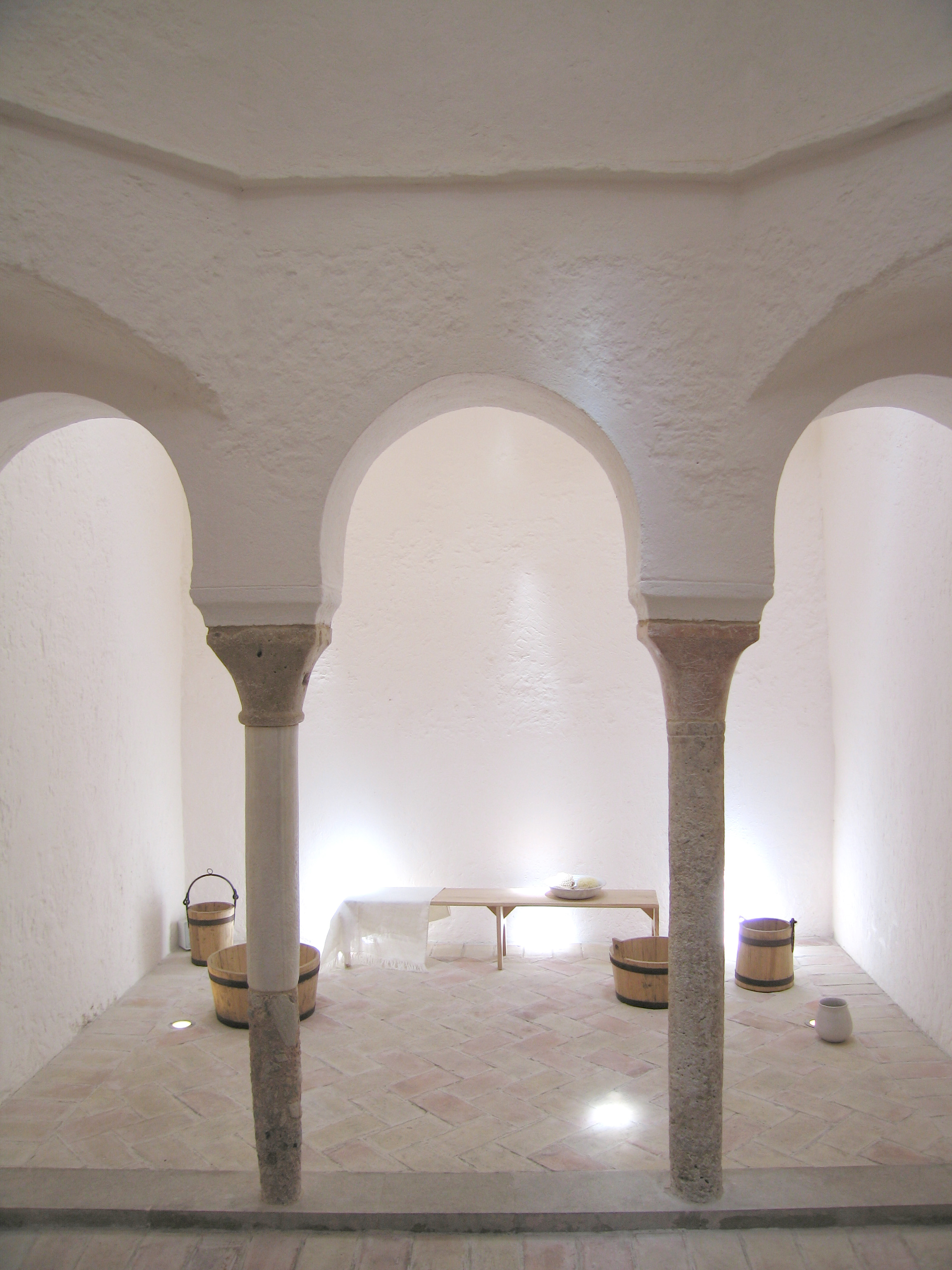 Banys de l'Almirall(València)